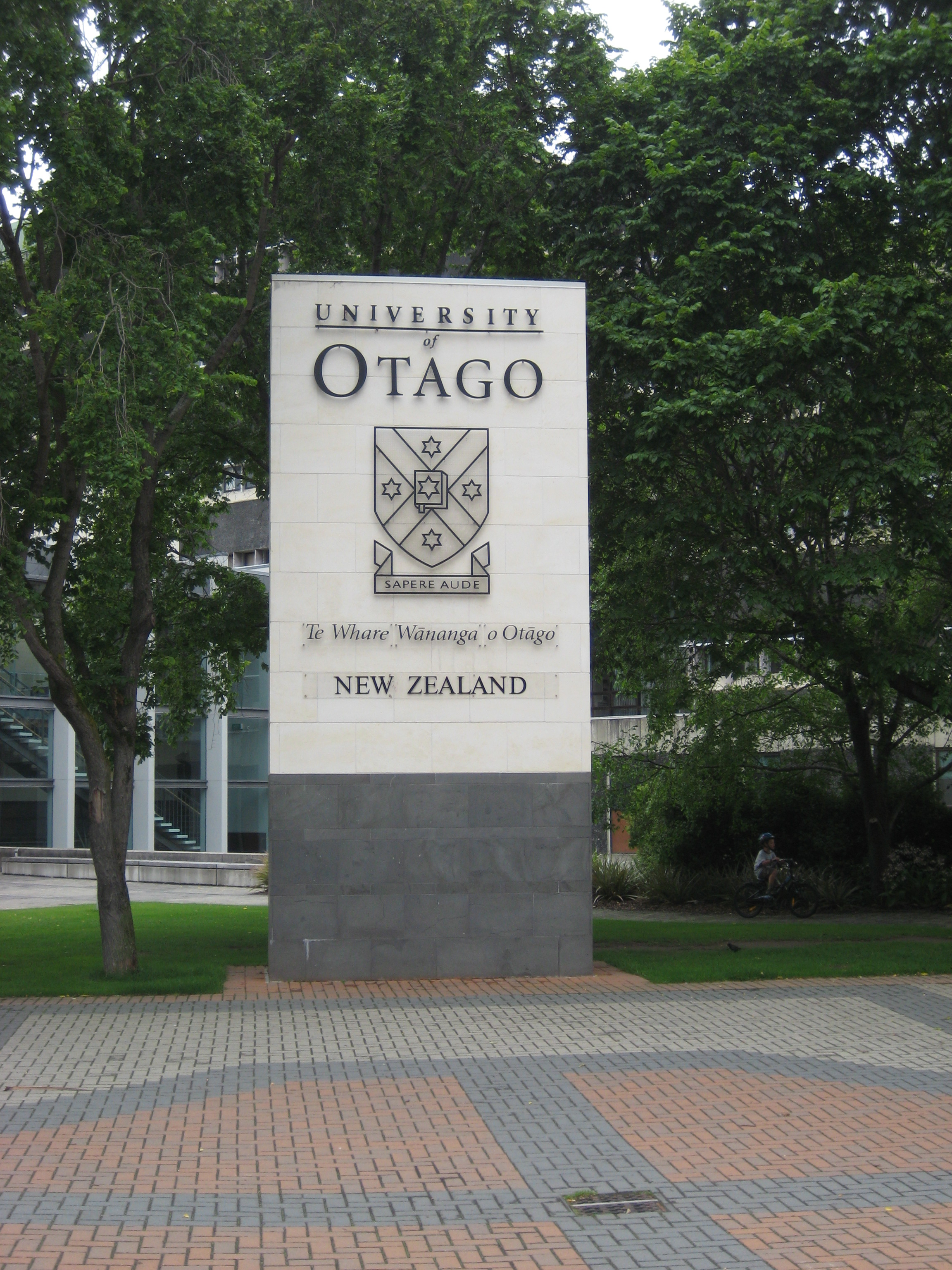 Université d'Otago à Dunedin